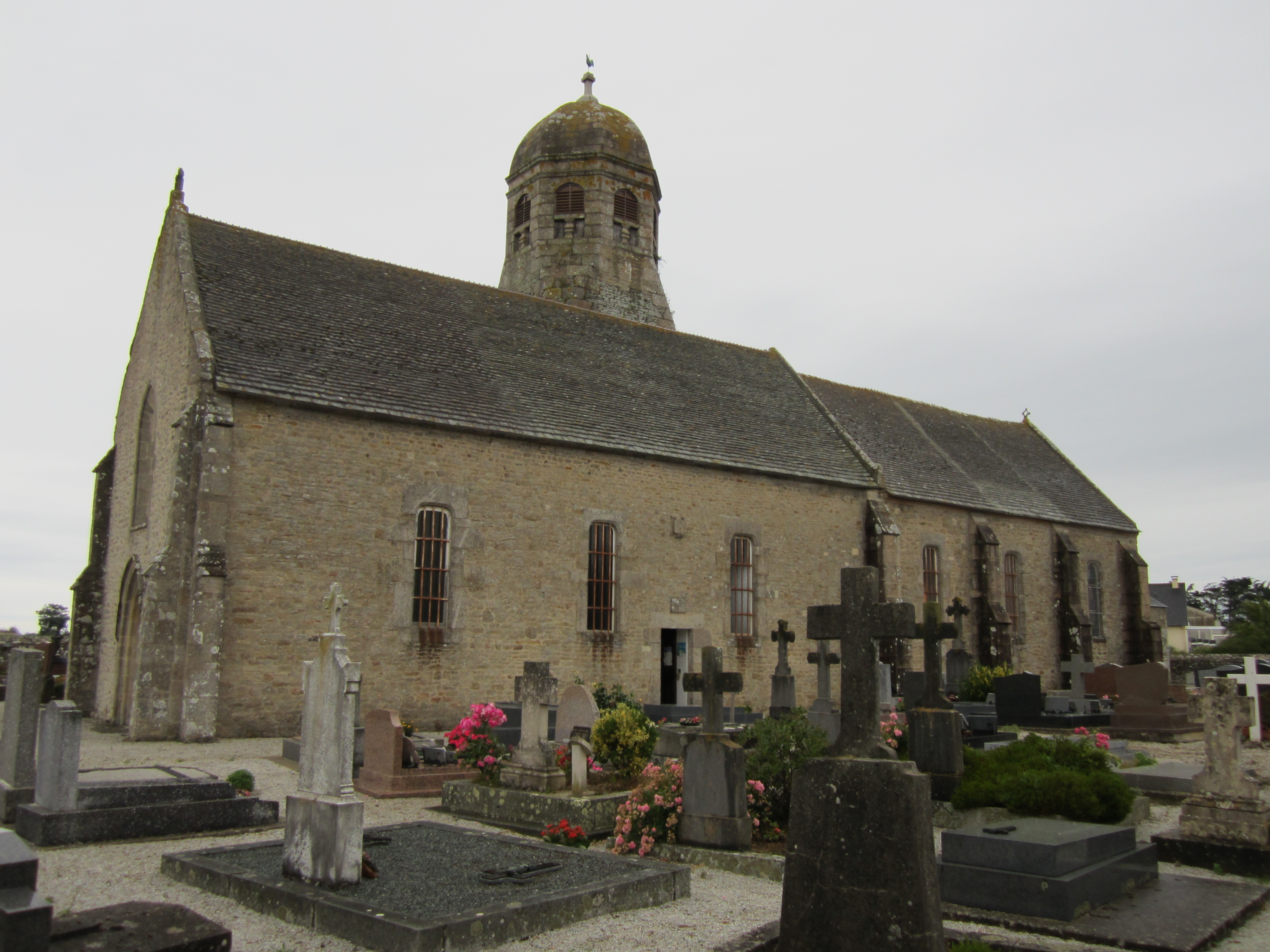 Église Notre-Dame de Gouberville, MAnche .